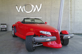 WOW Museum in Nelson. Autos & Kostüme